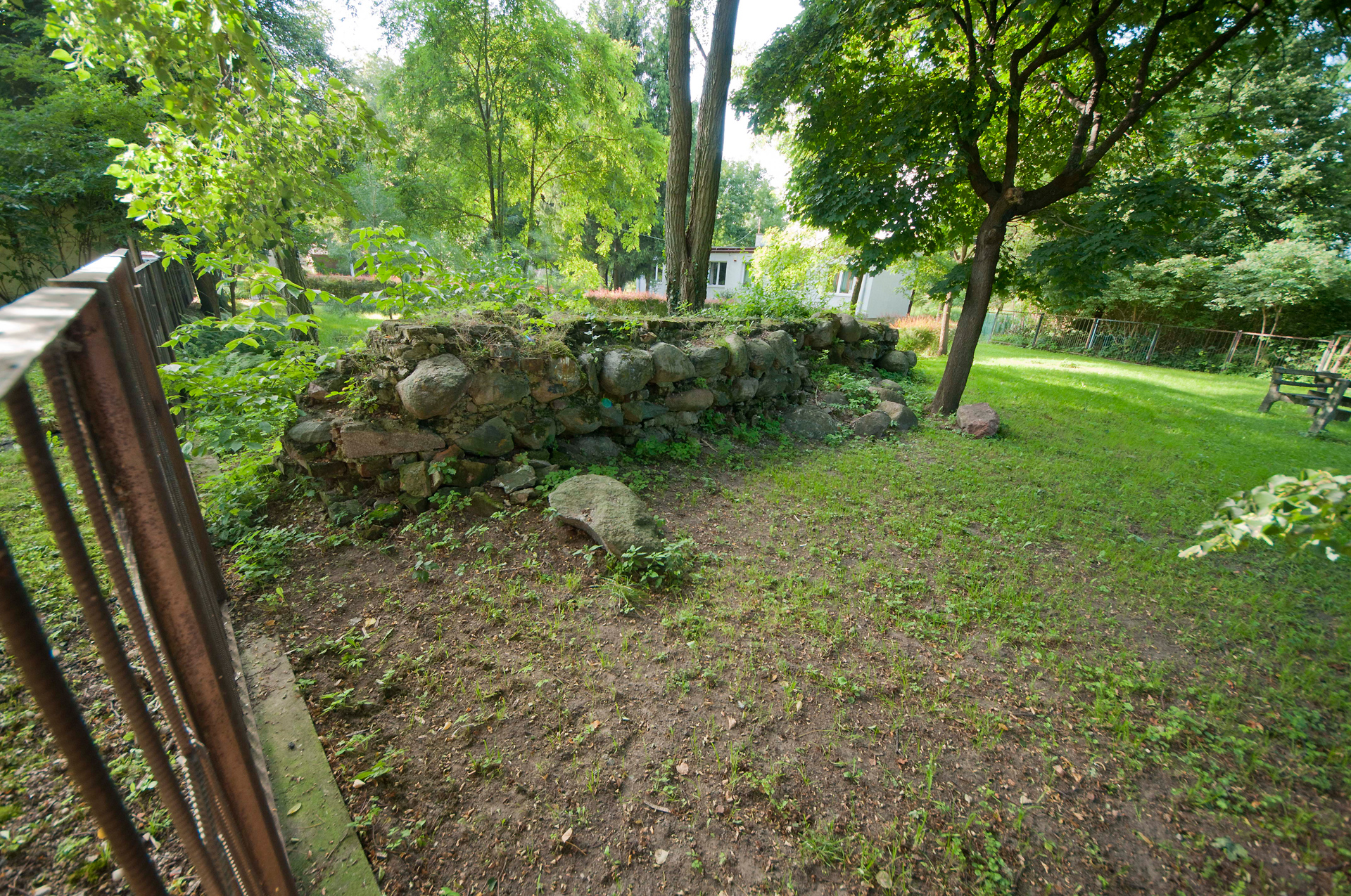 ruiny zamku gotyckiego wraz z kamiennymi obwarowaniami znajdującymi się w odległości ok. 20 m. od zamku Pisz, Pisz (miasto)